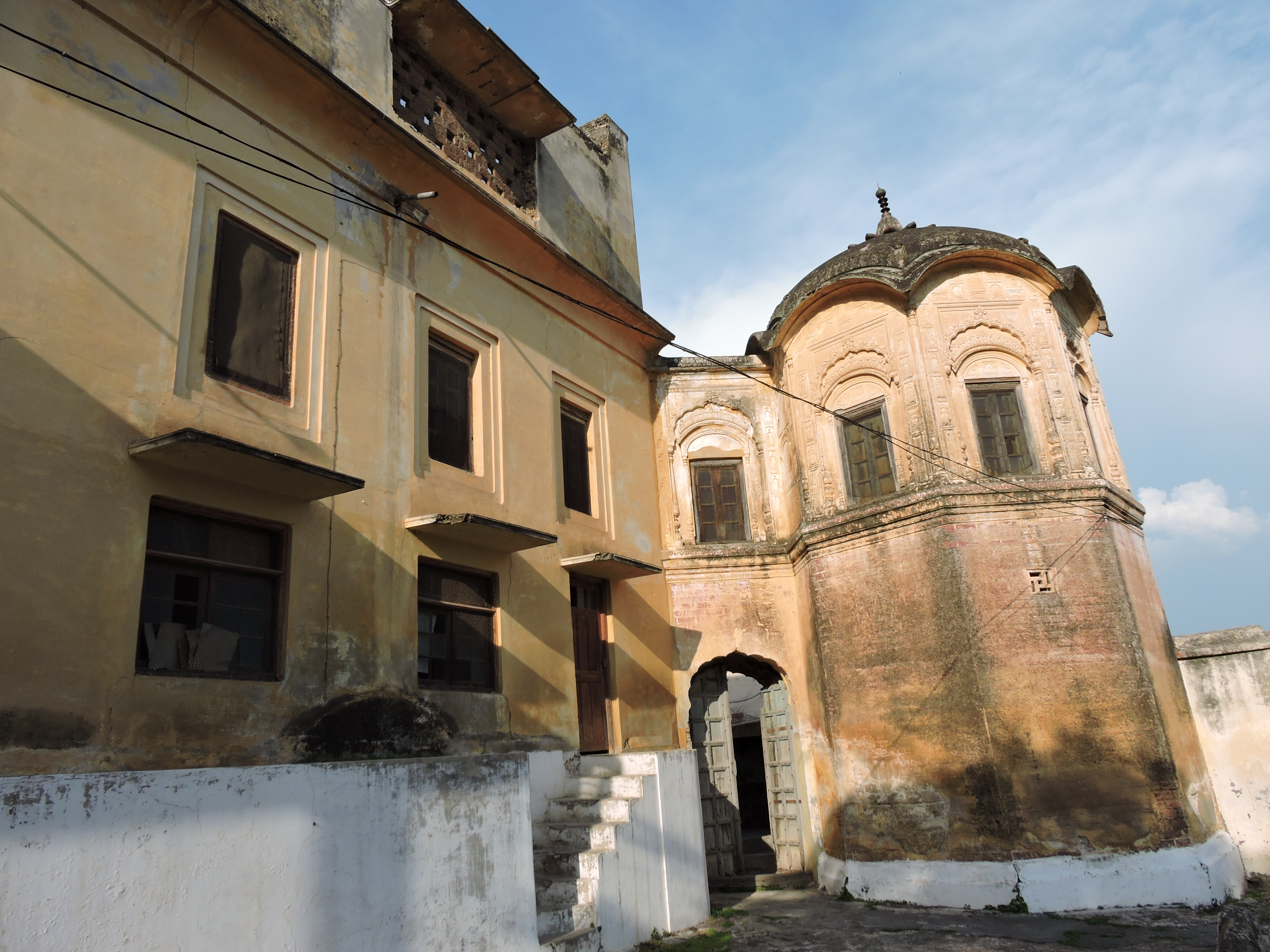 ਪੰਜਾਬੀ: ਅਰਕੀ ਦਾ ਕਿਲਾ